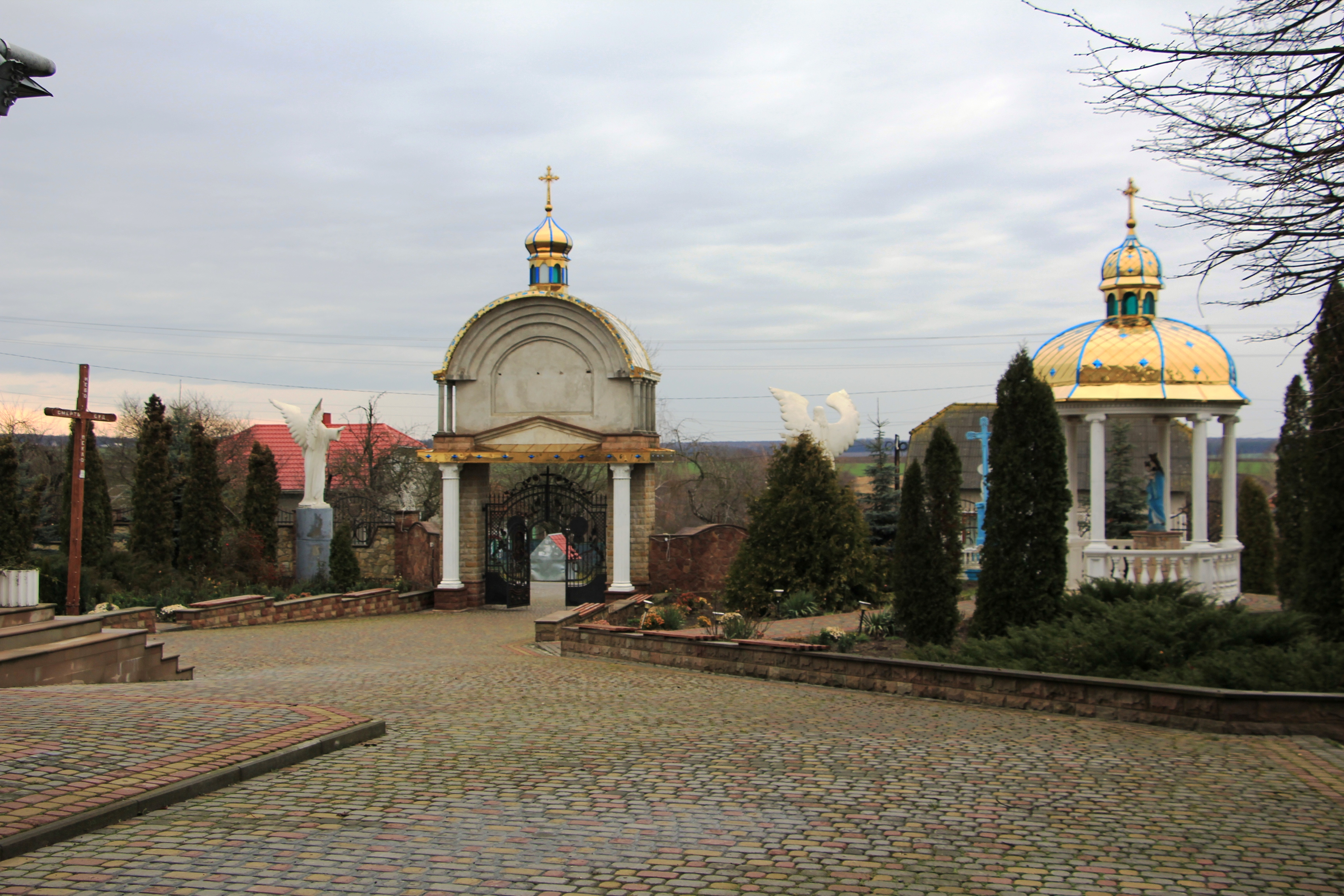 Церква Покрови Пресвятої Богородиці 1994 (вхідна зона)